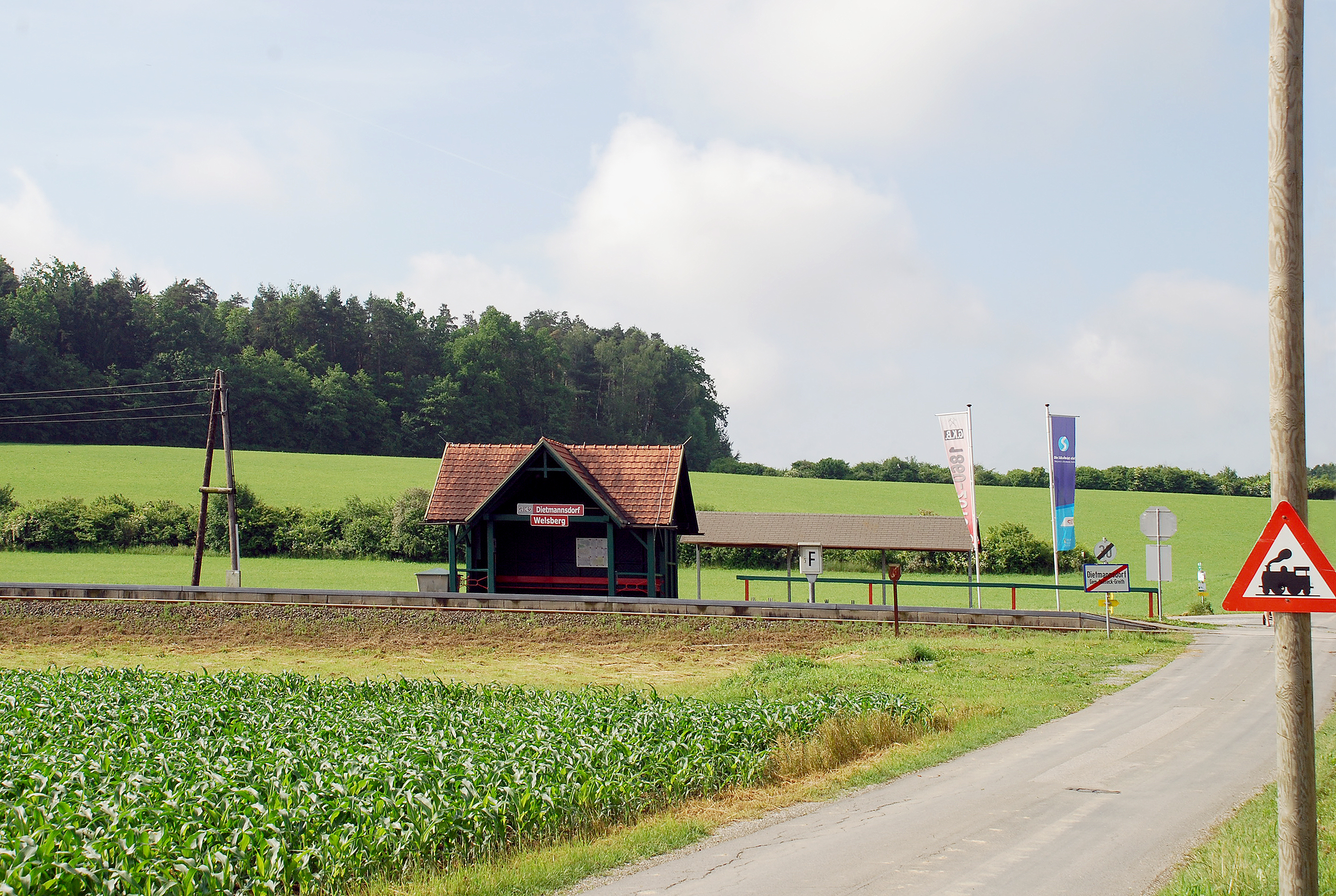 Sulmeck-Greith, Steiermark, Österreich: Haltestelle Dietmannsdorf - Welsberg der Graz-Köflacher-Bahn.